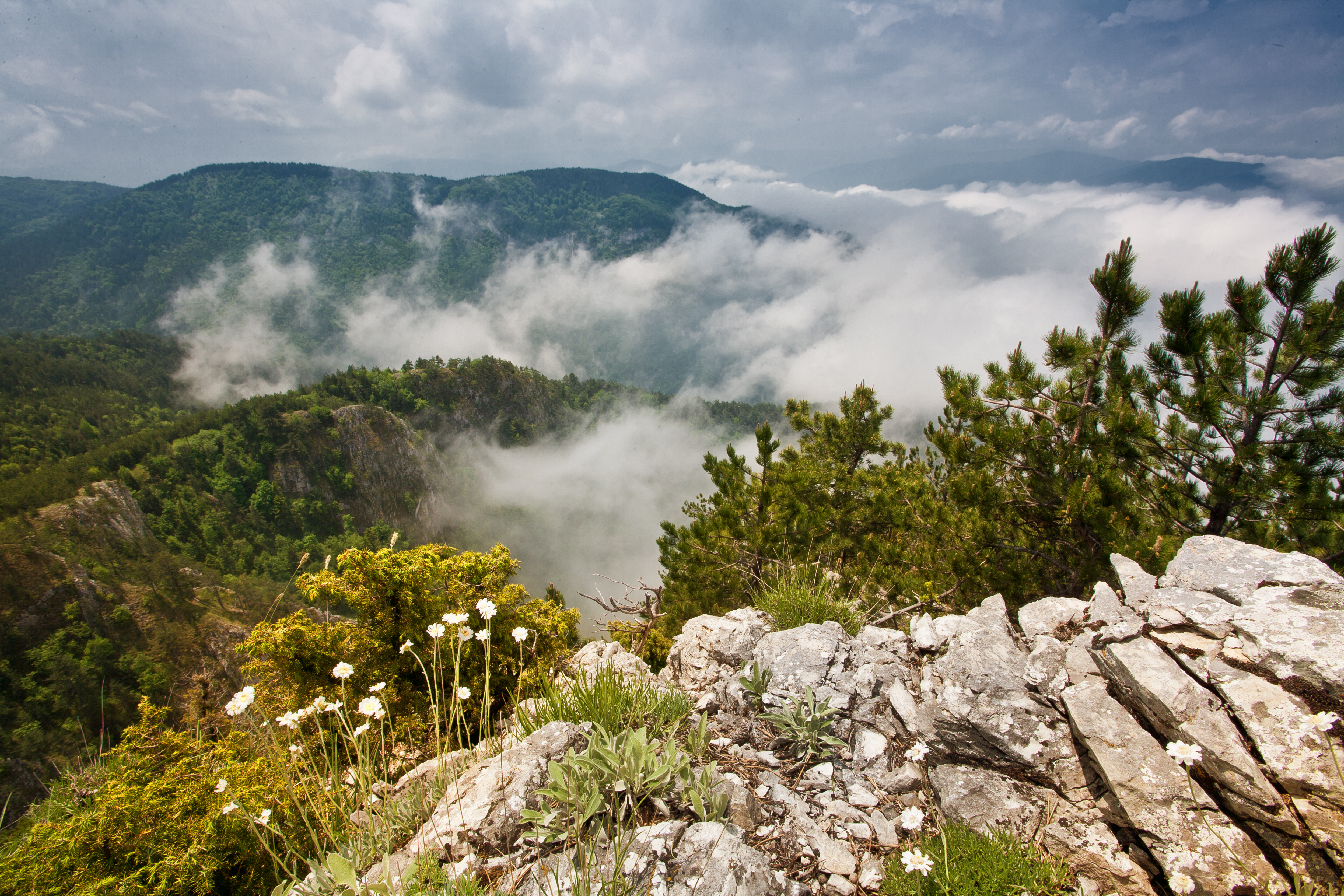 Паномарен изглед към Биосферен парк Червената стена